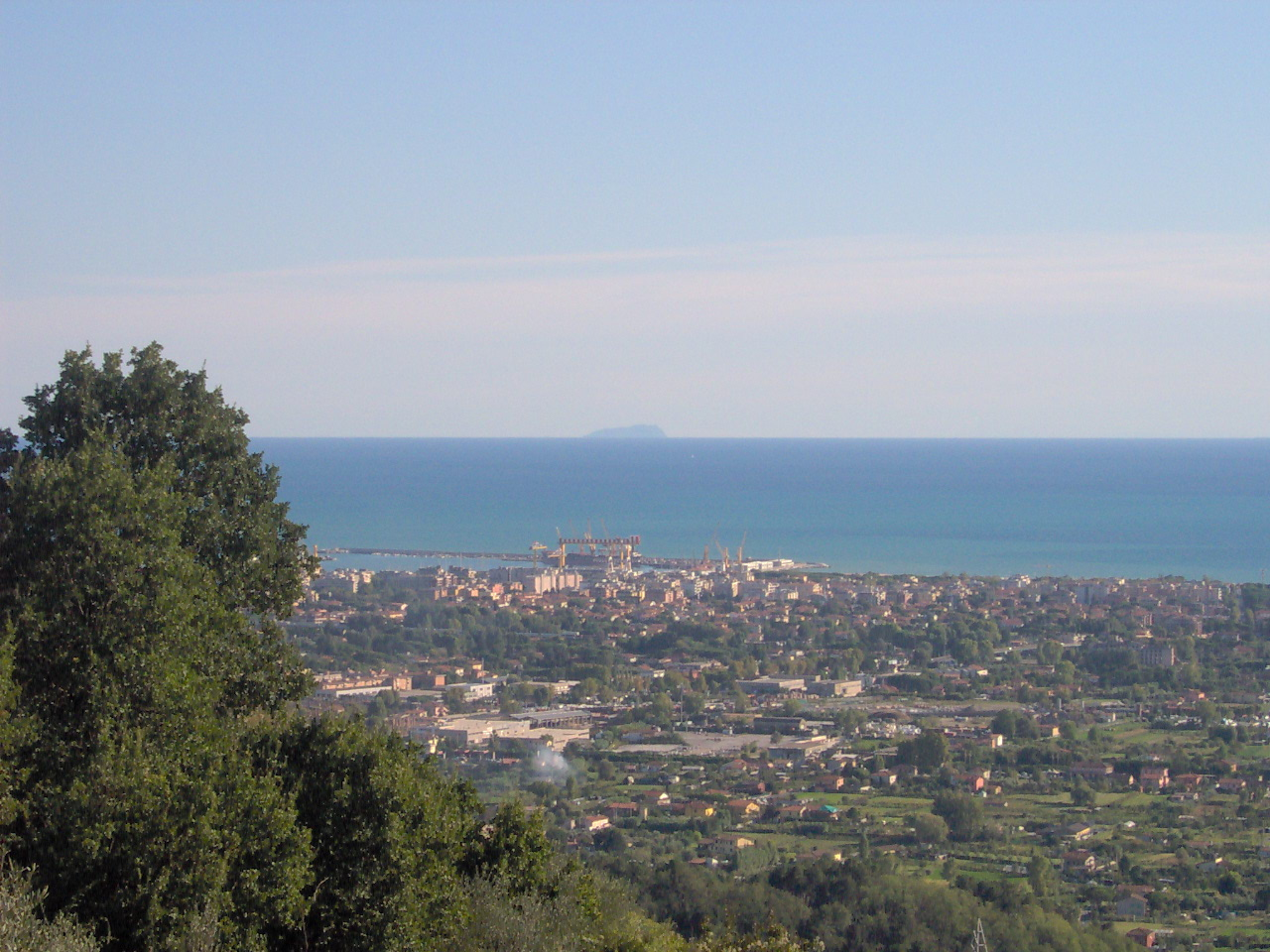 Marina di Carrara vista da Ortonovo. Sullo sfondo l'isola Gorgona